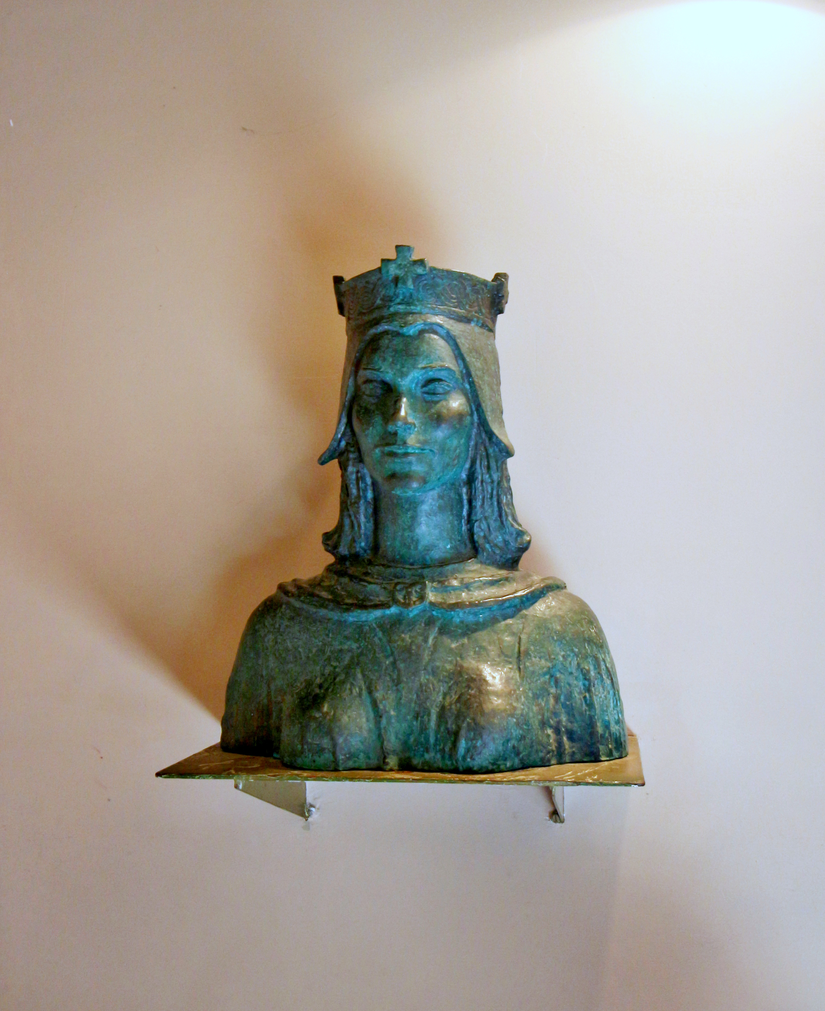 Město Solin u Splitu